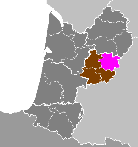 Maps of arrondissements and cantons of France: Département de Lot-et-Garonne - Arrondissement de Villeneuve-sur-Lot.PNG (Région Aquitaine)